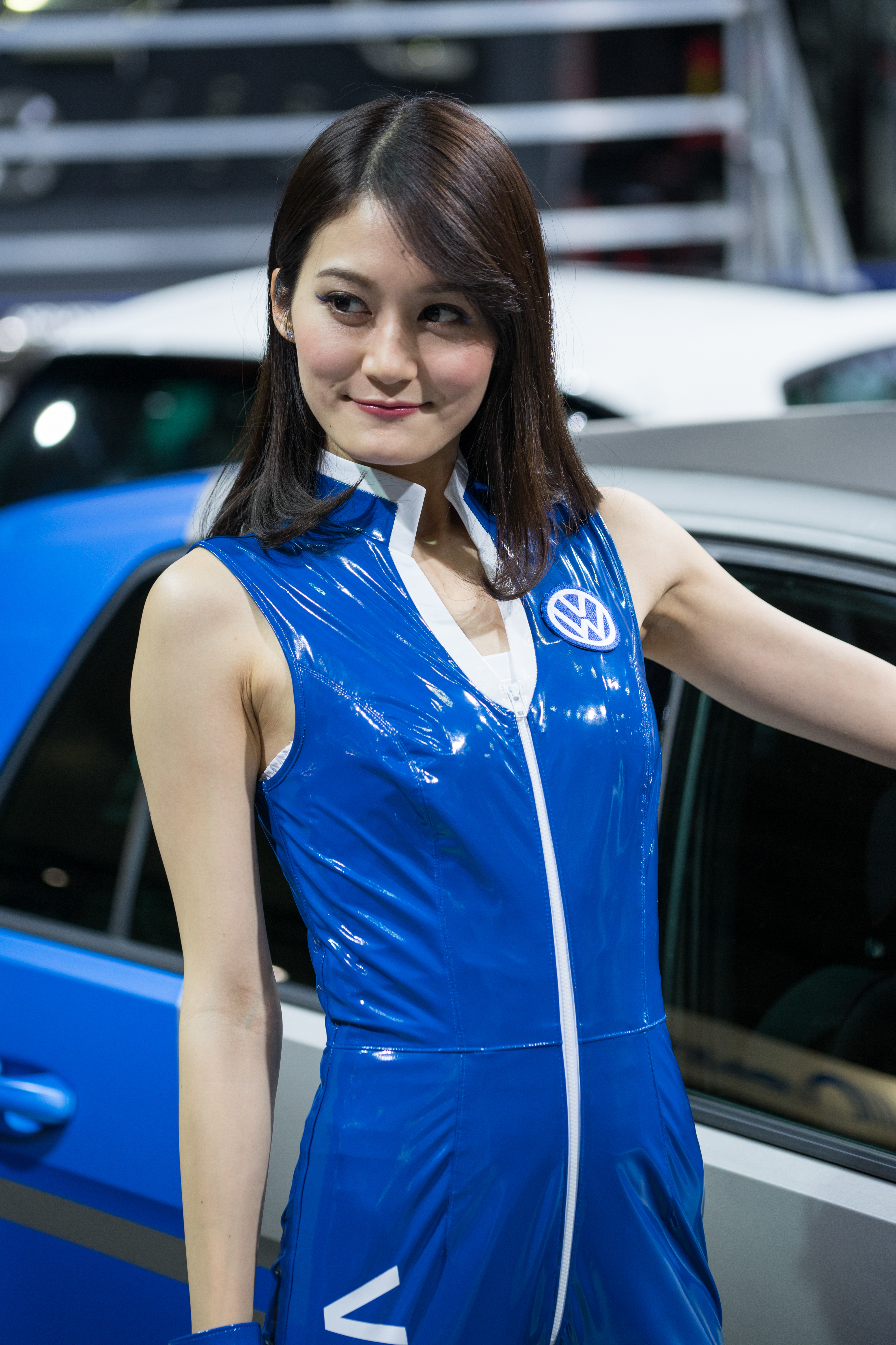 TOKYO AUTO SALON 2017 （東京オートサロン2017）-146.jpg